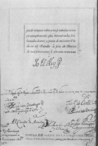 Real Cédula creating Mateo de Toro y Zambrano Count of la Conquista.